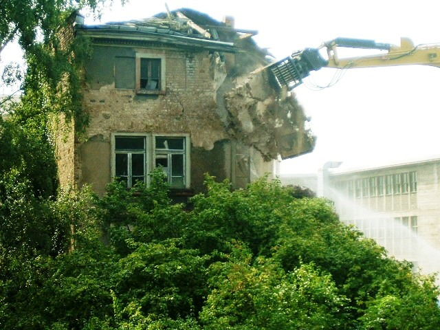 Abriss eines Wohn - und Geschäftshauses in Frankfurt Bockenheim August 2007